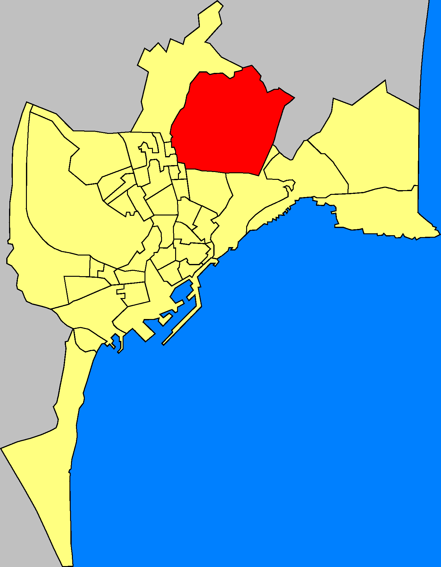 Imagen barrio de Juan XXIII en Alicante